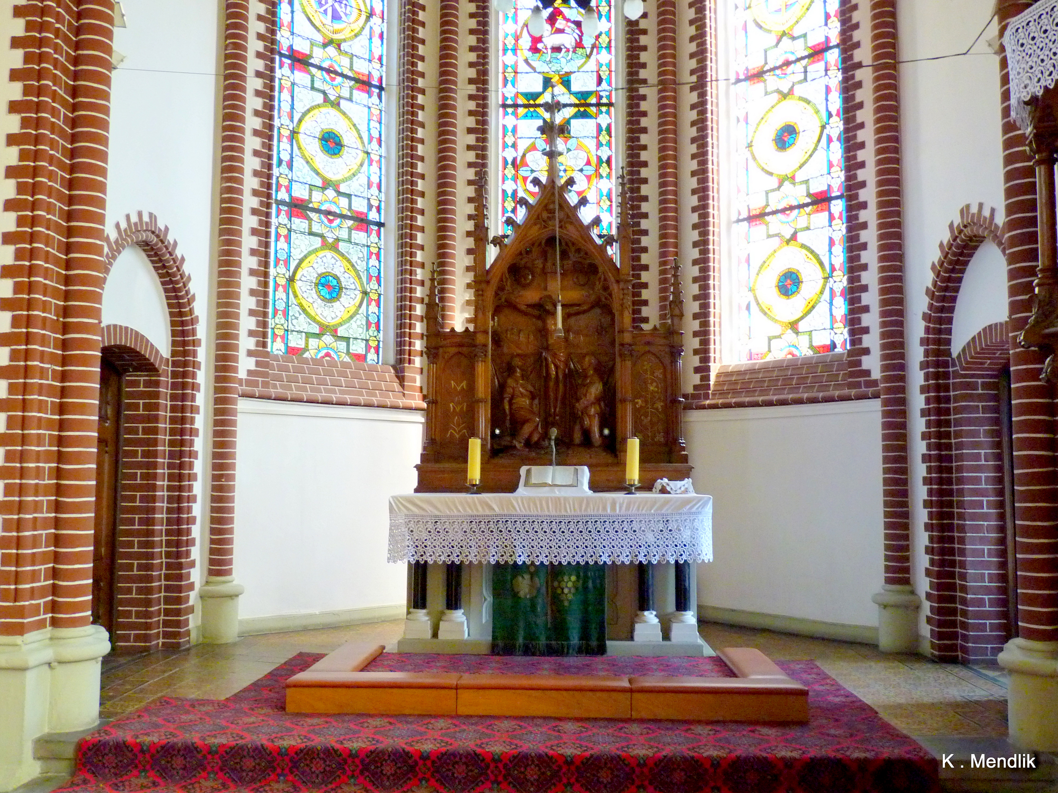 Bytom, Poland